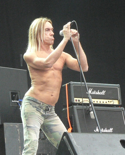 IGGY POP. Budapest, Sziget Festival 2006 08 15